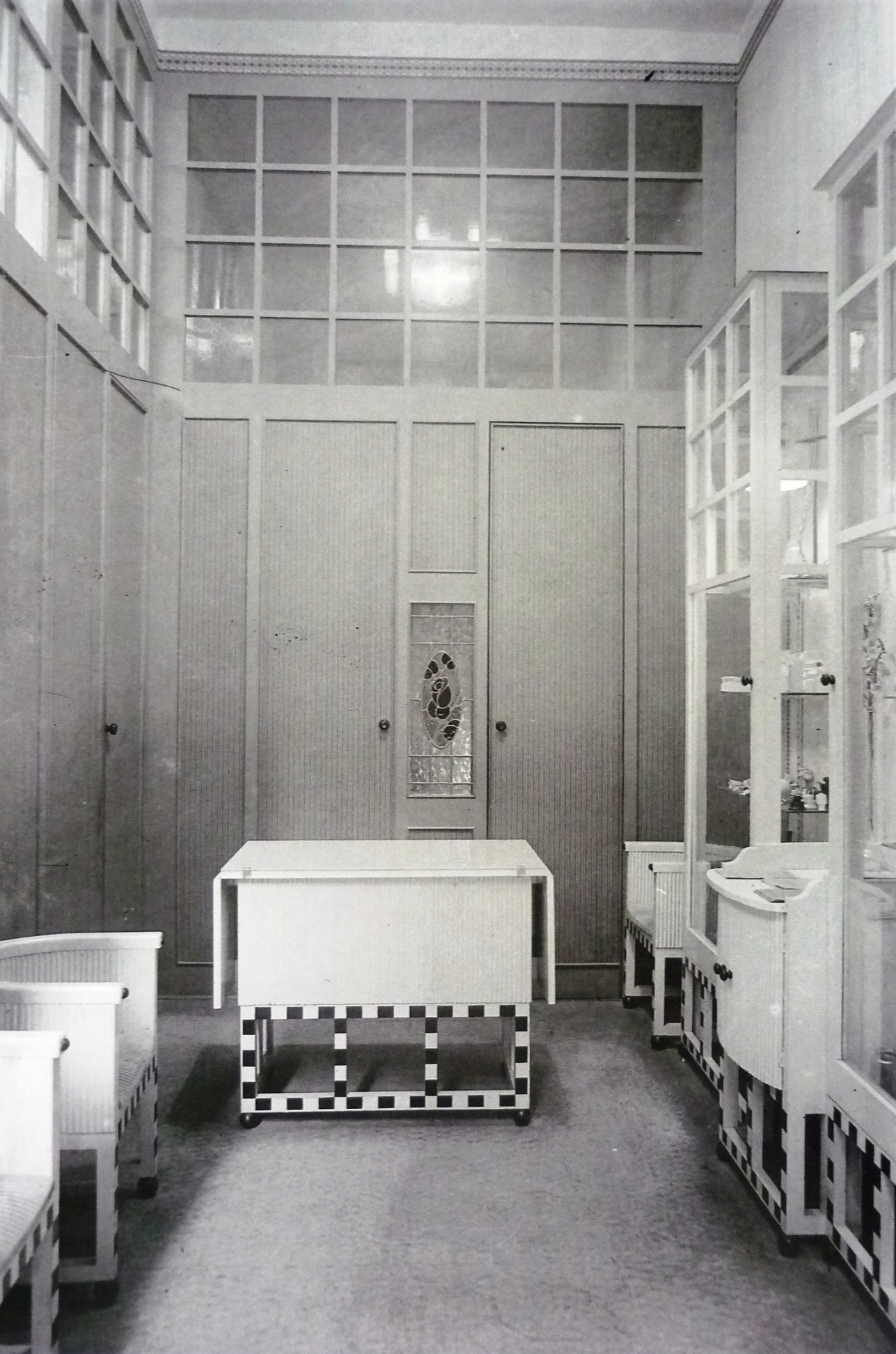 botiga de material elèctric